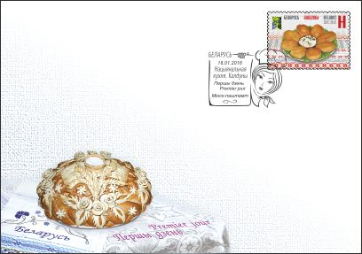 Канверт першага дня.